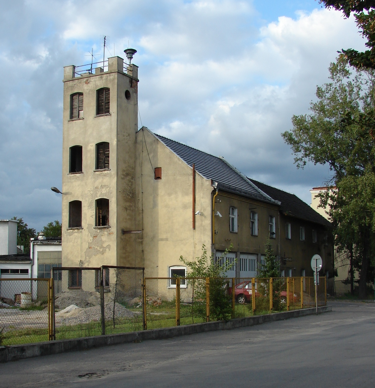 Old fire station in Główna, Poznań